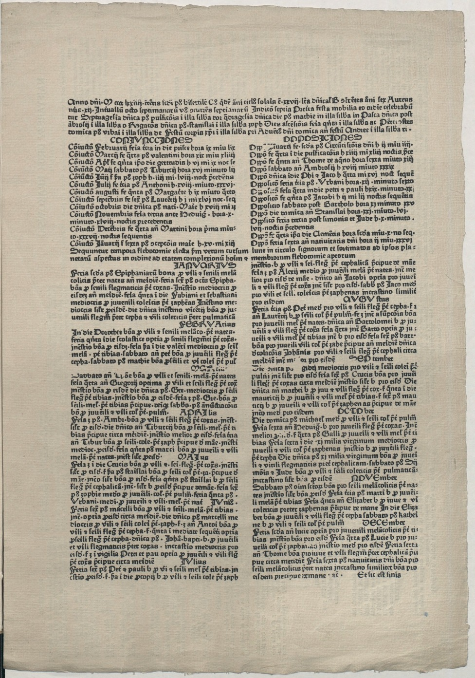 Inkunabuł - kalendarz na rok 1474, uznawany za najstarszy polski druk